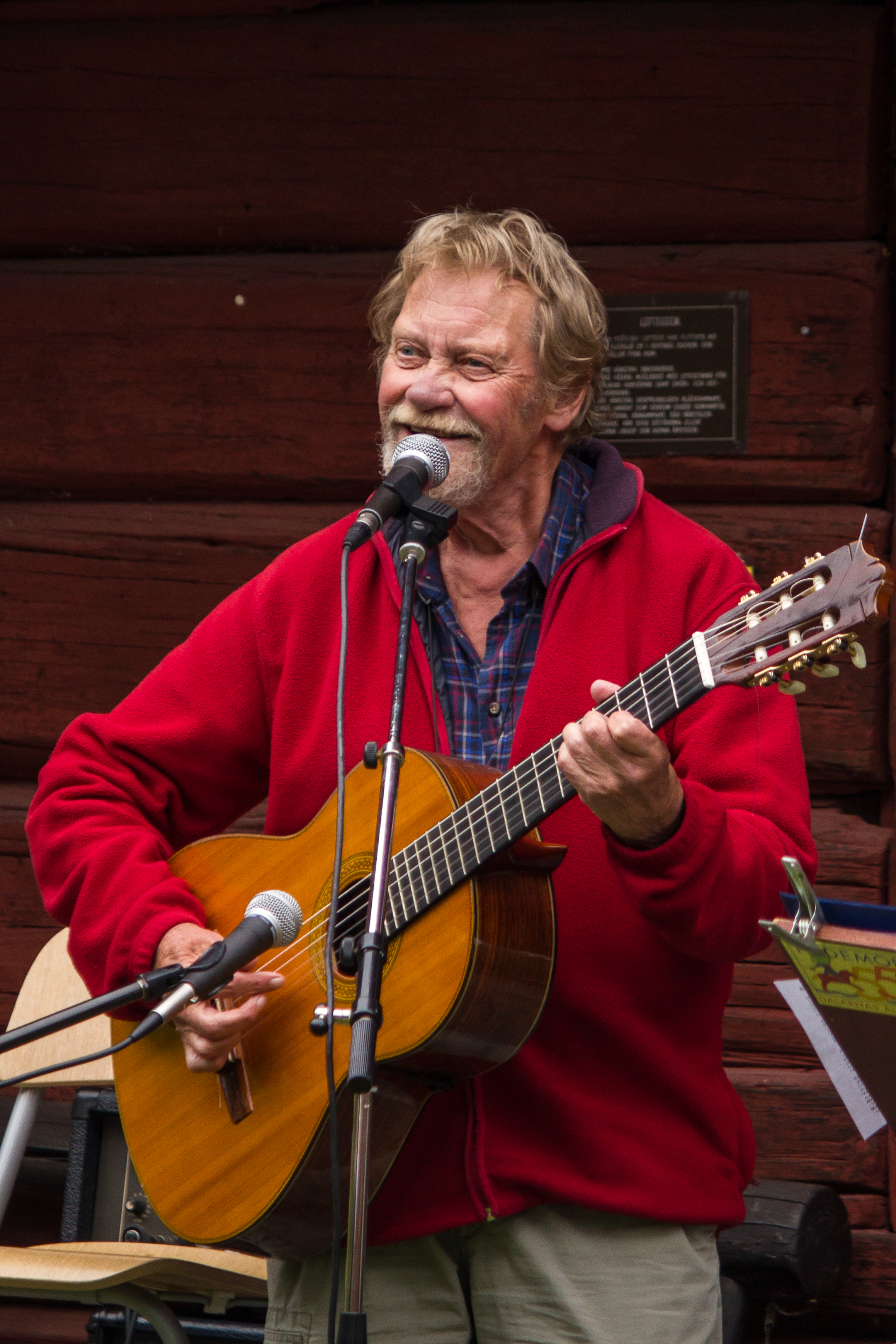 Björn Jadling uppträder på Hedemora gammelgård